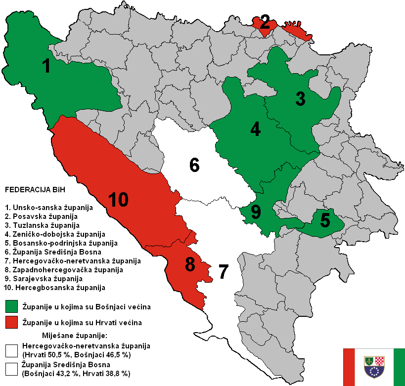 Županije FBiH - etnički sastav stanovništva, GFDL-self